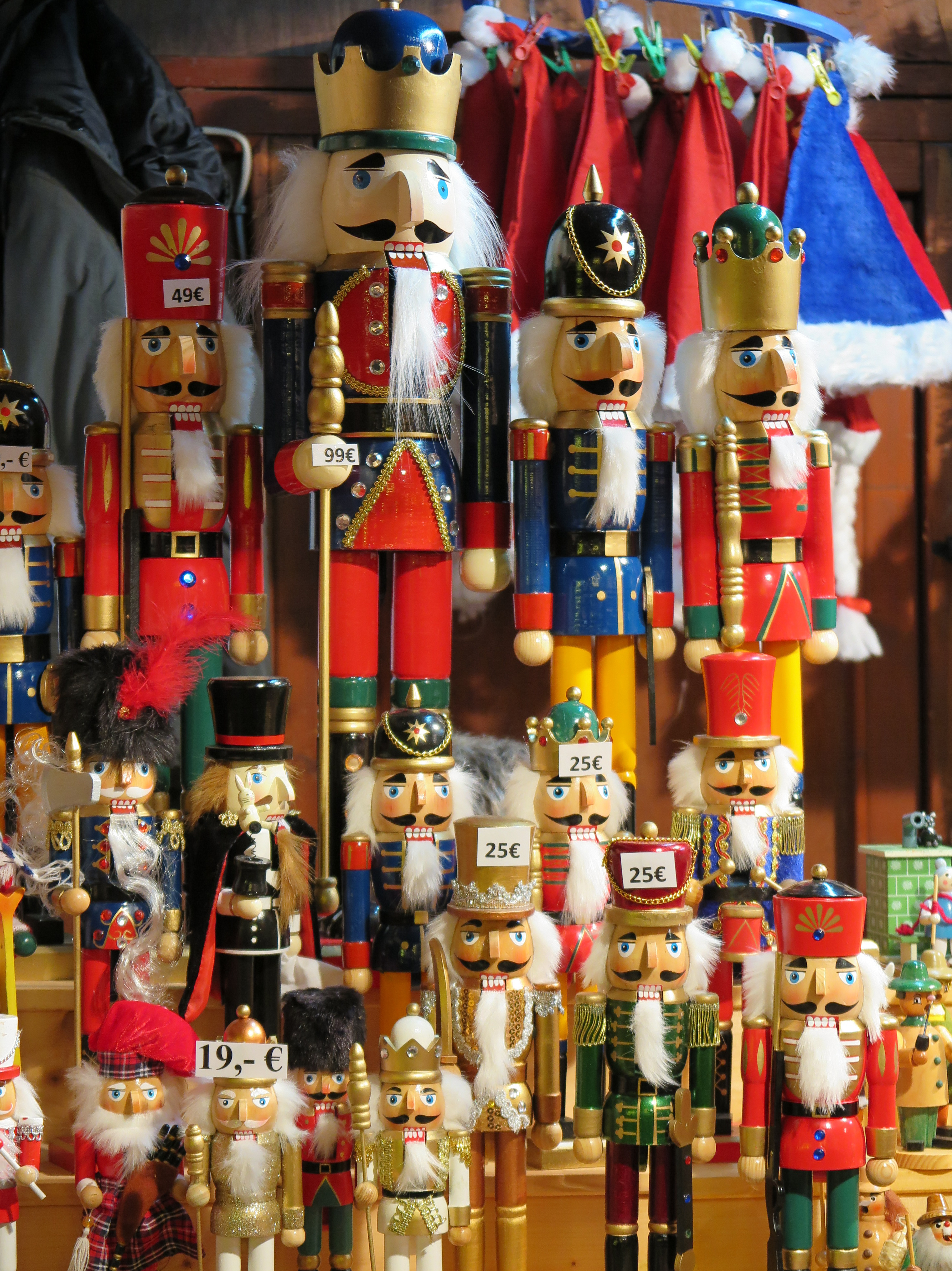 Berlin Christmas Market I